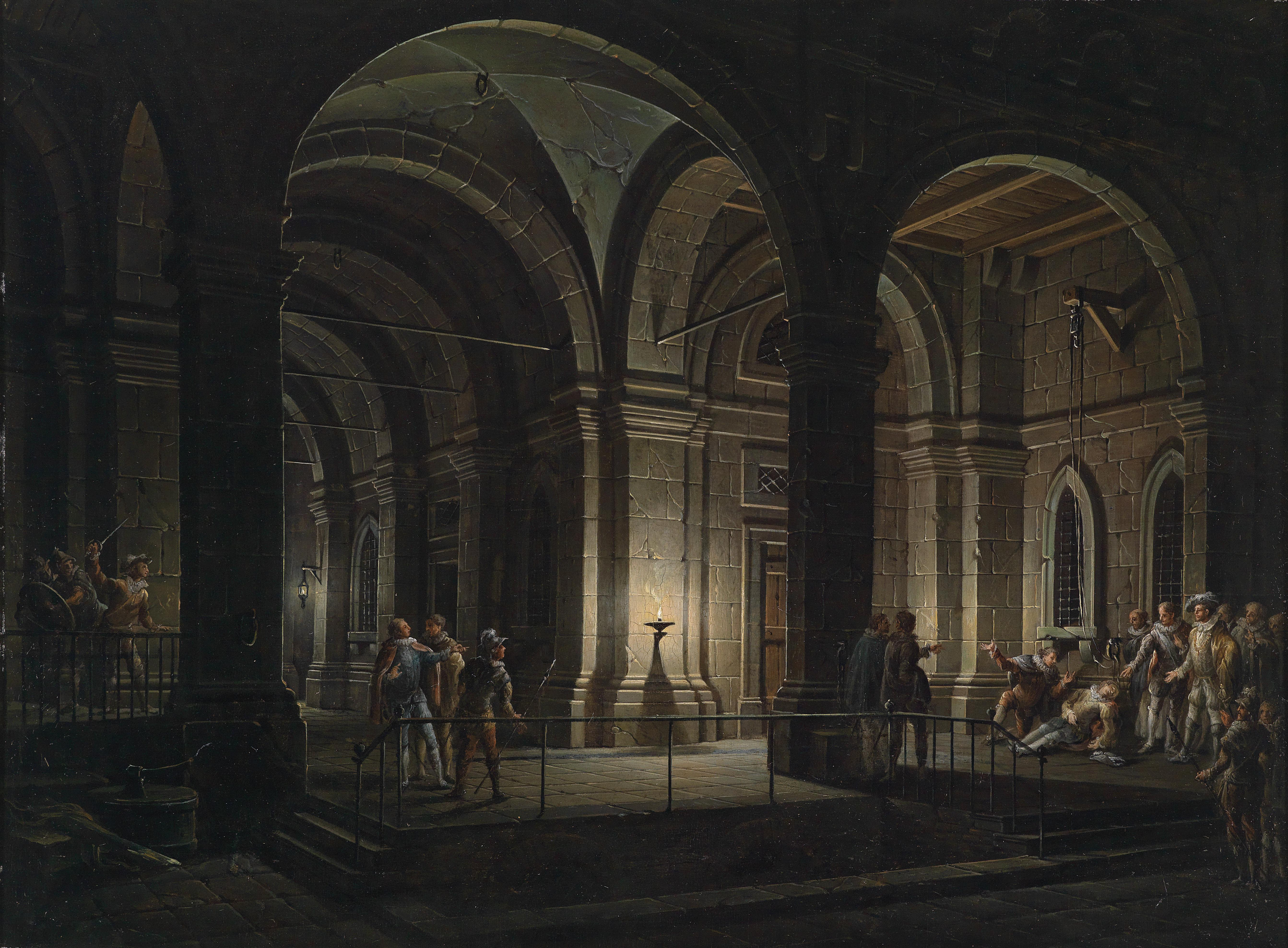 Phantastische Gefängnisarchitektur mit Figuren im Kostüm des 17. Jahrhunderts, signiert unten links: J. Plazer, Öl auf Holz, 42 x 54,5 cm